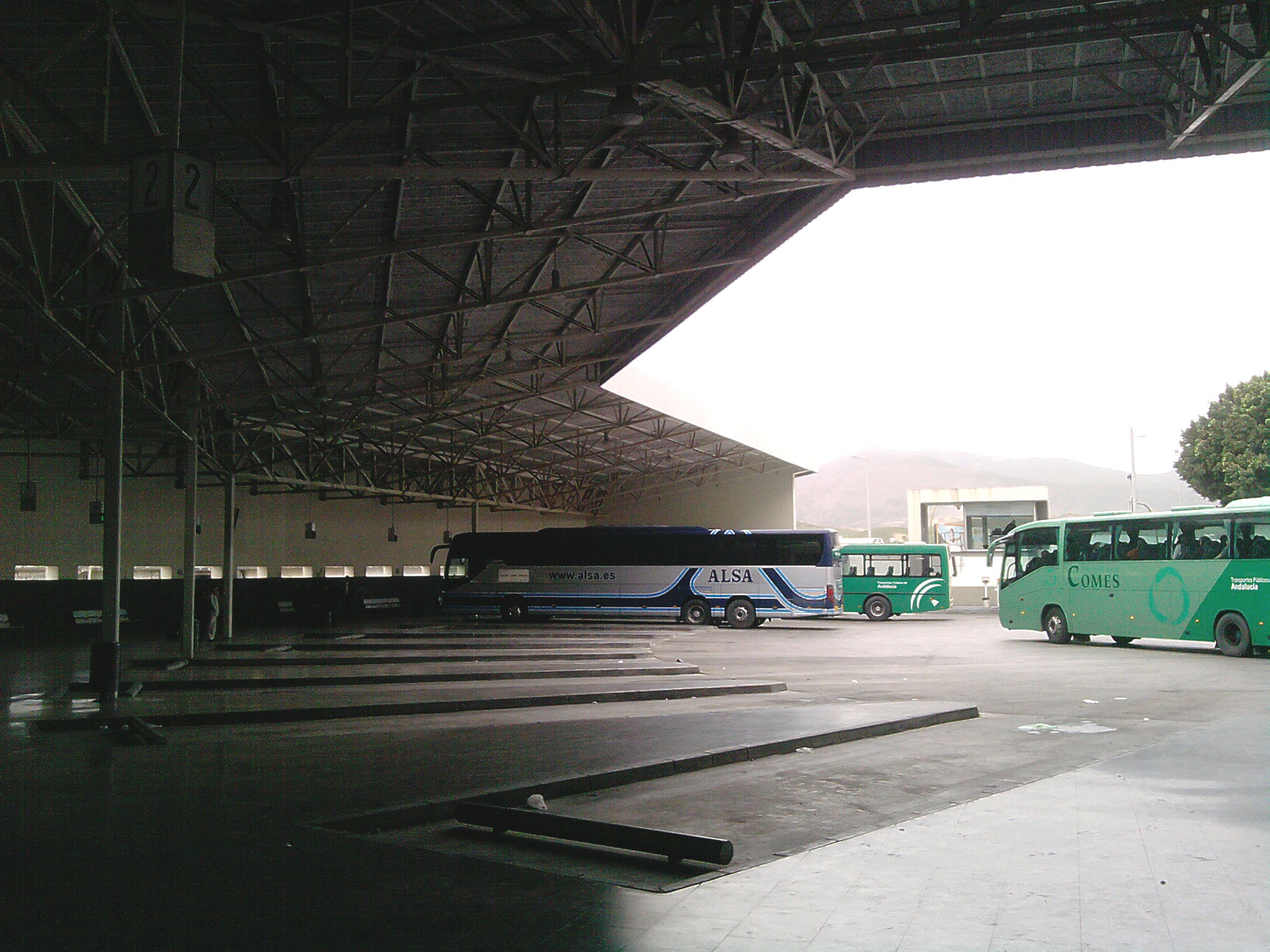 Interior de la estación de autobuses San Bernardo, Algeciras.